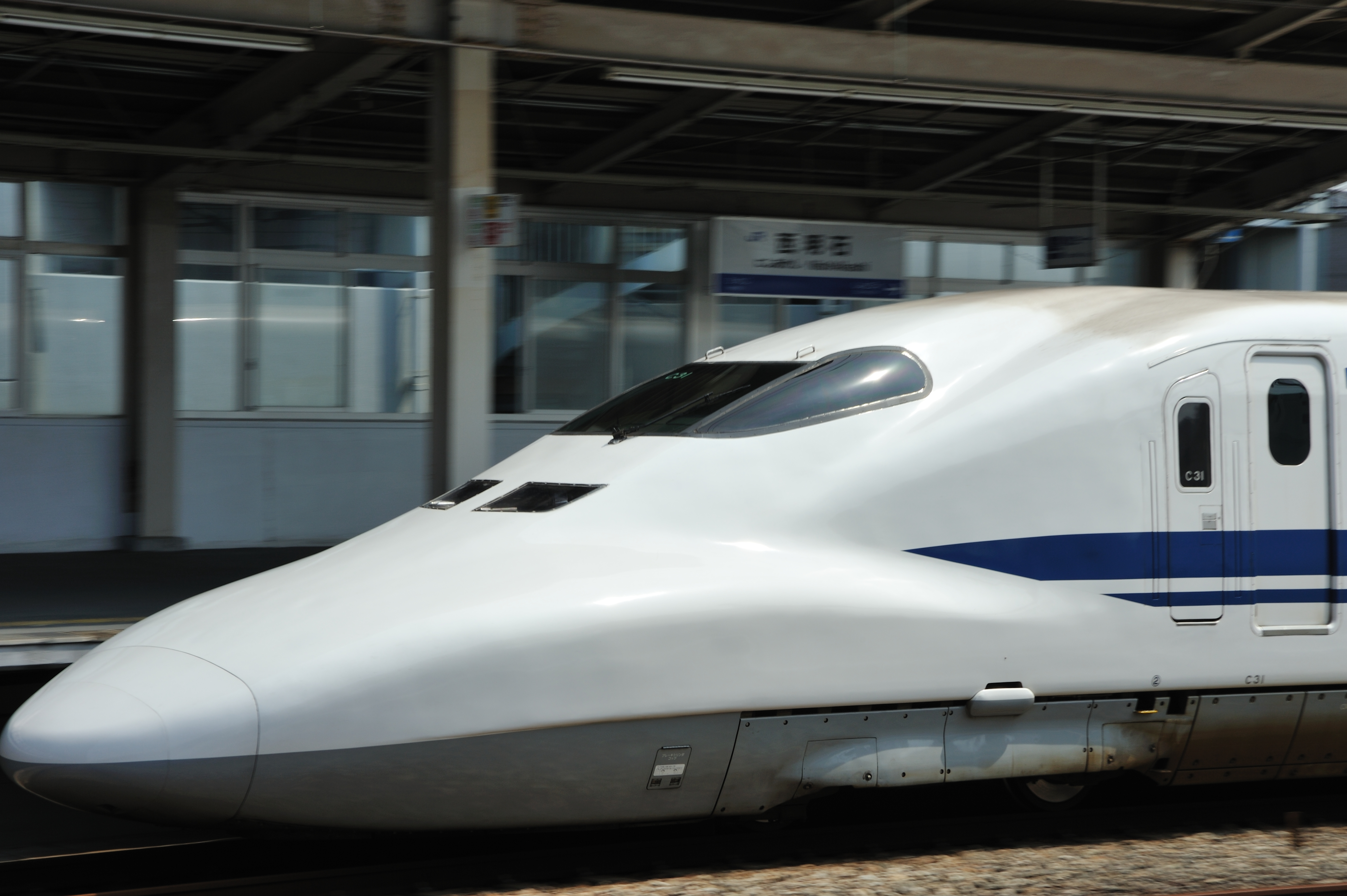 Nishi-Akashi